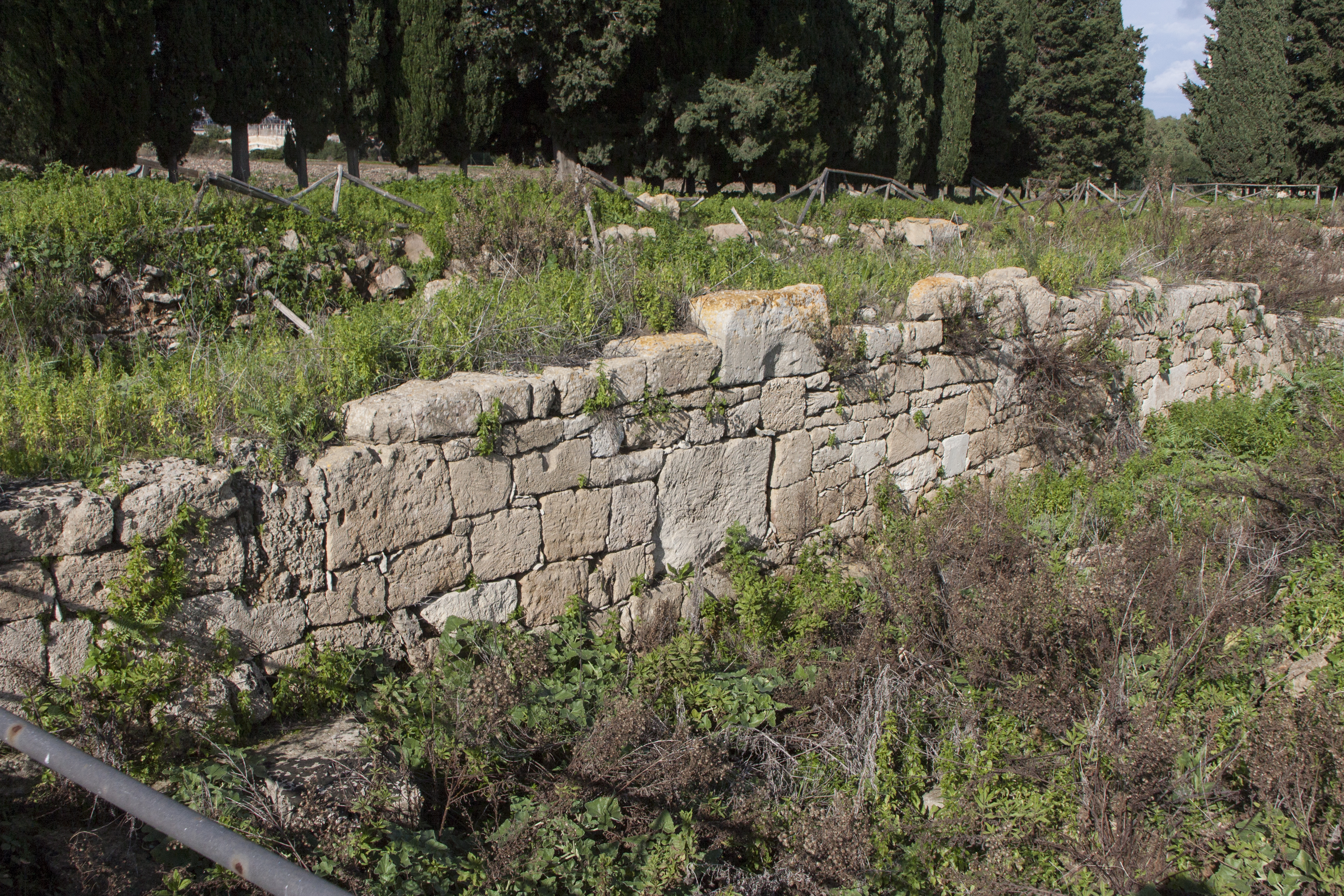 Mura ovest di Megara Hyblaea